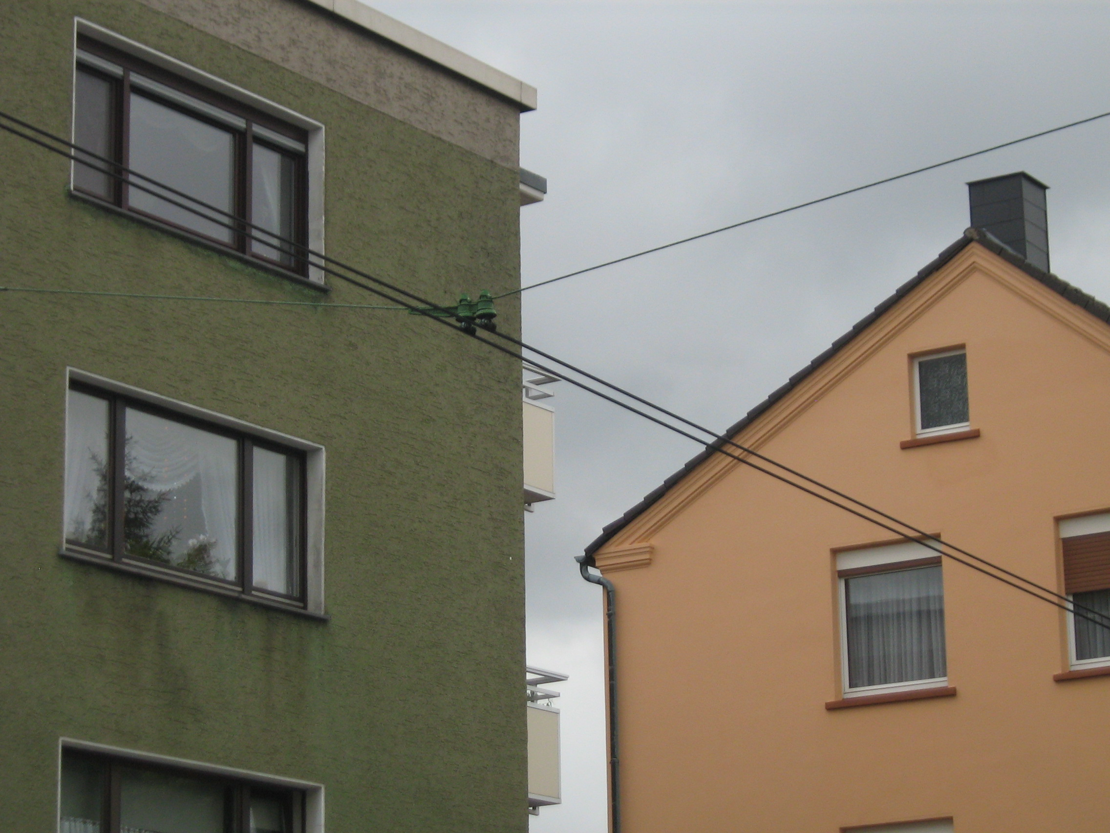 Straßenbahnoberleitung auf der Dr.C.-Otto-Straße in Bochum-Dahlhausen kurz vor der Erneuerung.